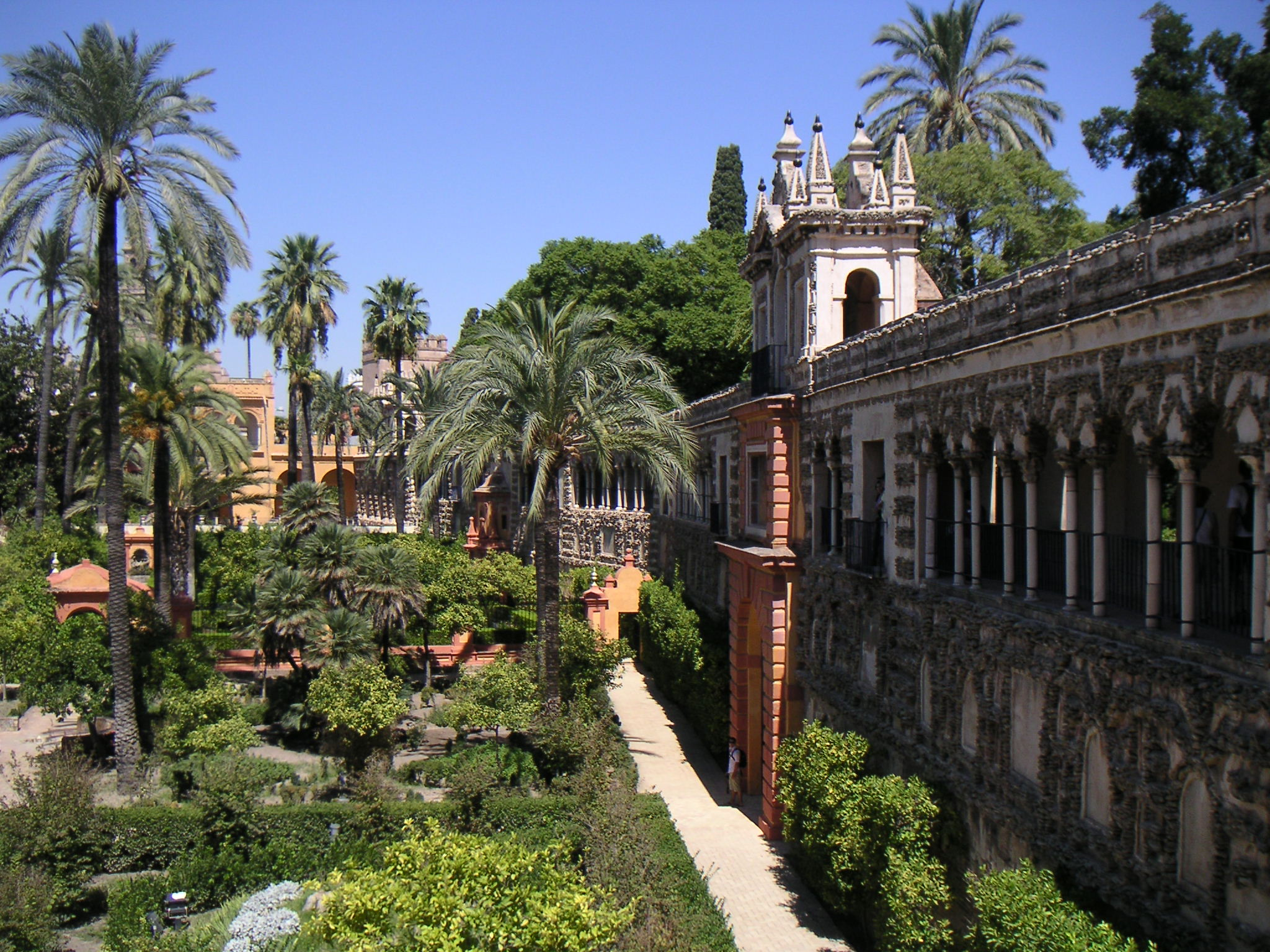 Alcazars Palace, Seville